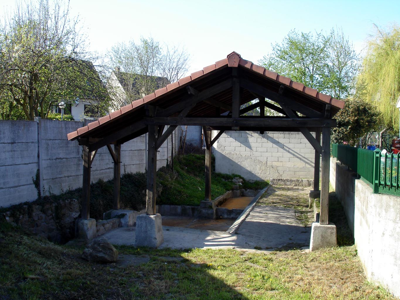 Le lavoir à Villepinte (Seine-Saint-Denis), France